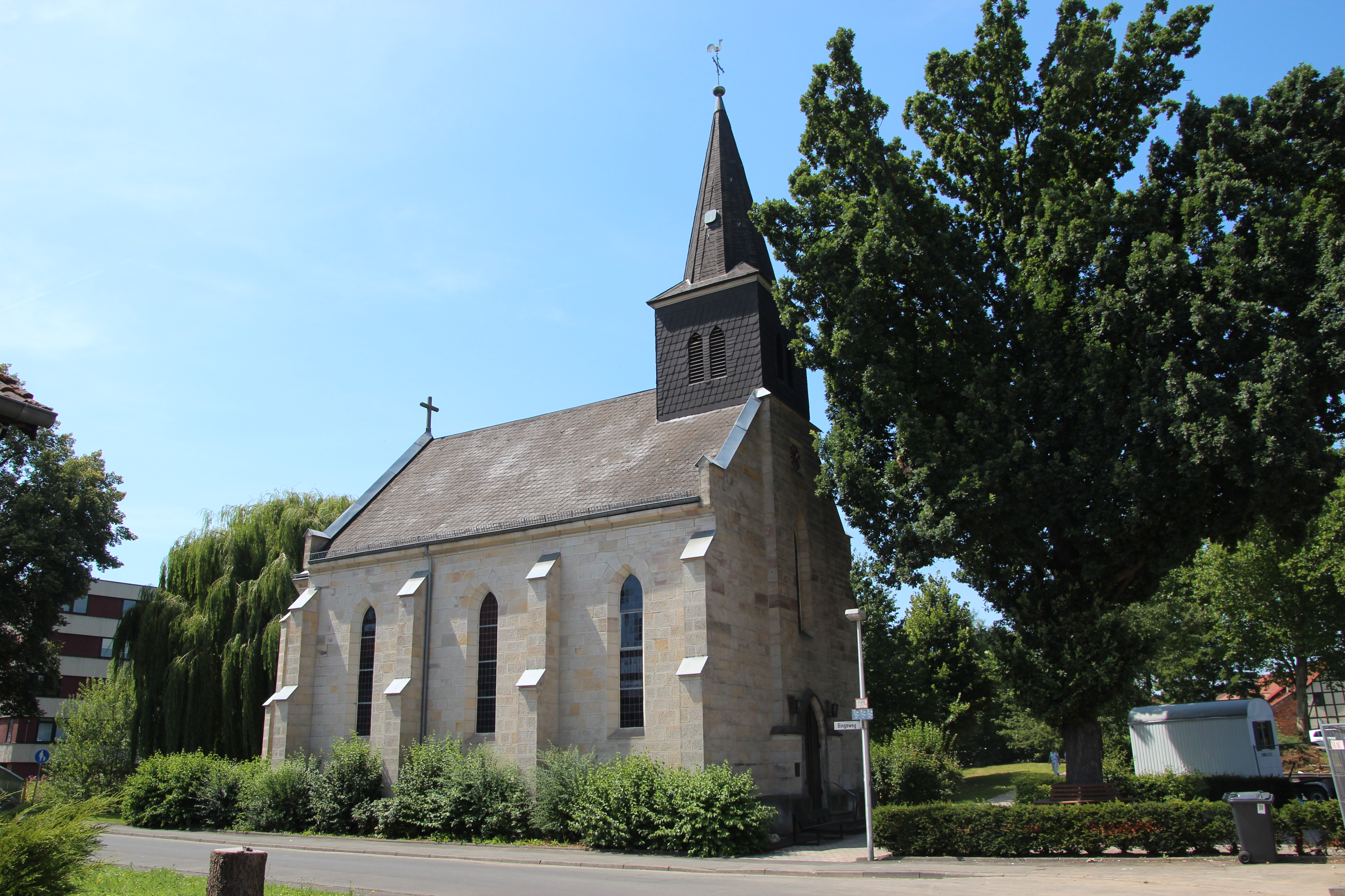 Evangelische Kirche Bingeweg 2 in Baunatal